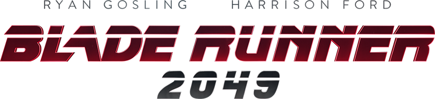 Logo von Blade Runner 2049